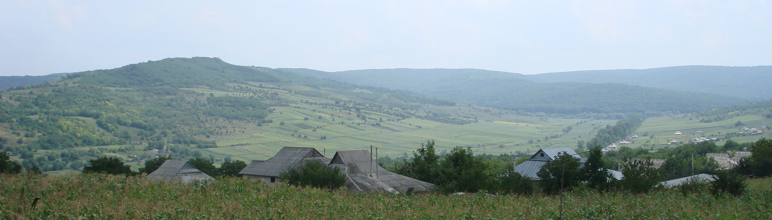 Пейзаж возле села Лозово Страшенского района Молдавии